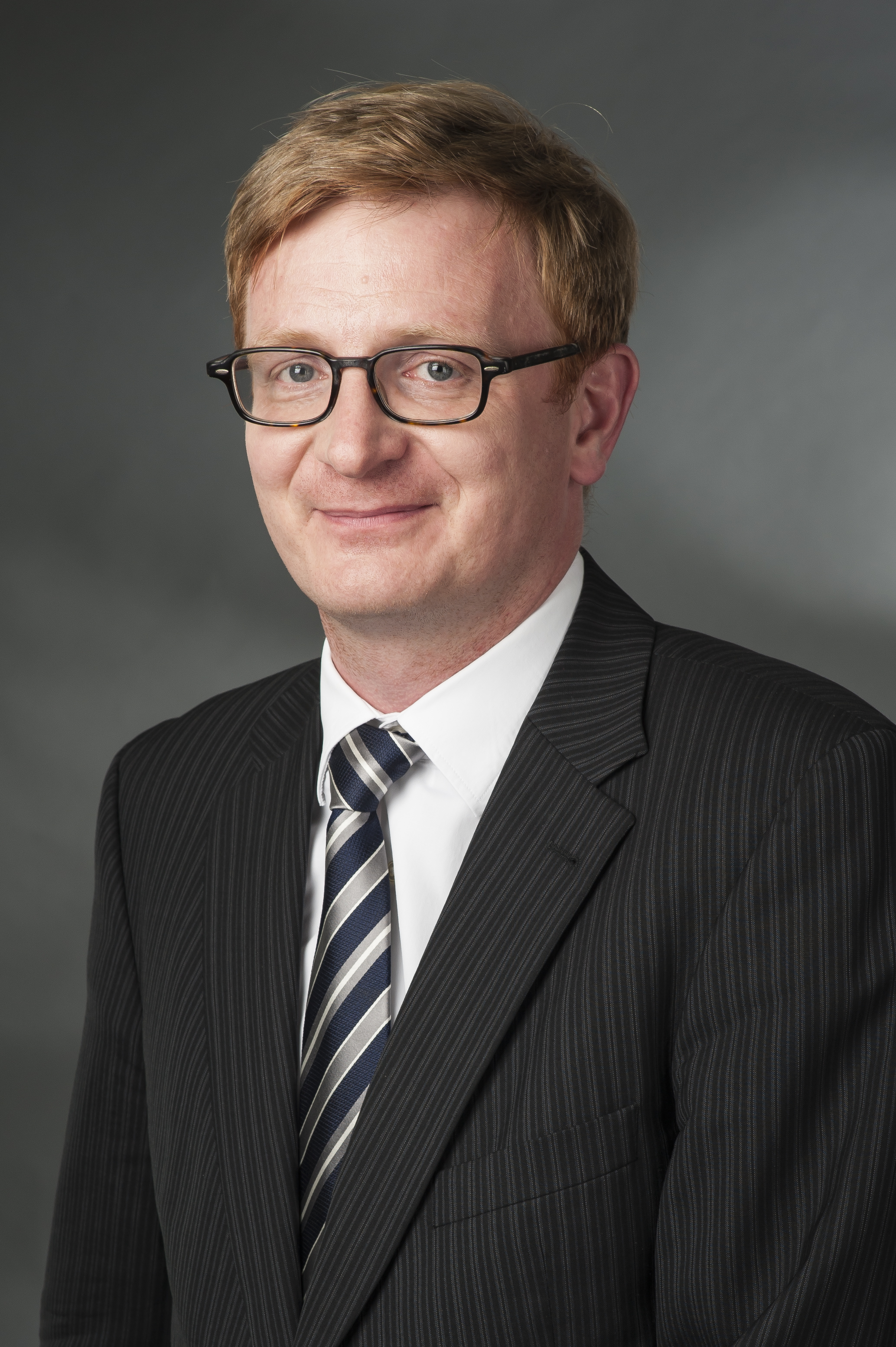 Philipp Lengsfeld (* 21. März 1972 in Ost-Berlin) ist ein deutscher Physiker. Er war einer der vier relegierten Schüler der Ossietzky-Affäre 1988 in Berlin-Pankow. Lengsfeld ist Bundestagsabgeordneter der Berliner CDU.